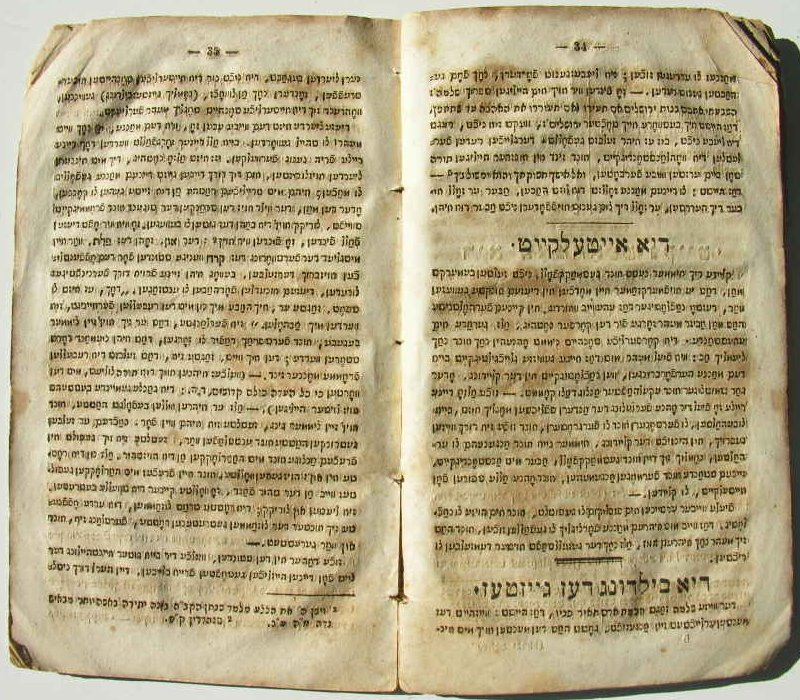 страница из книги מחנה ישראל